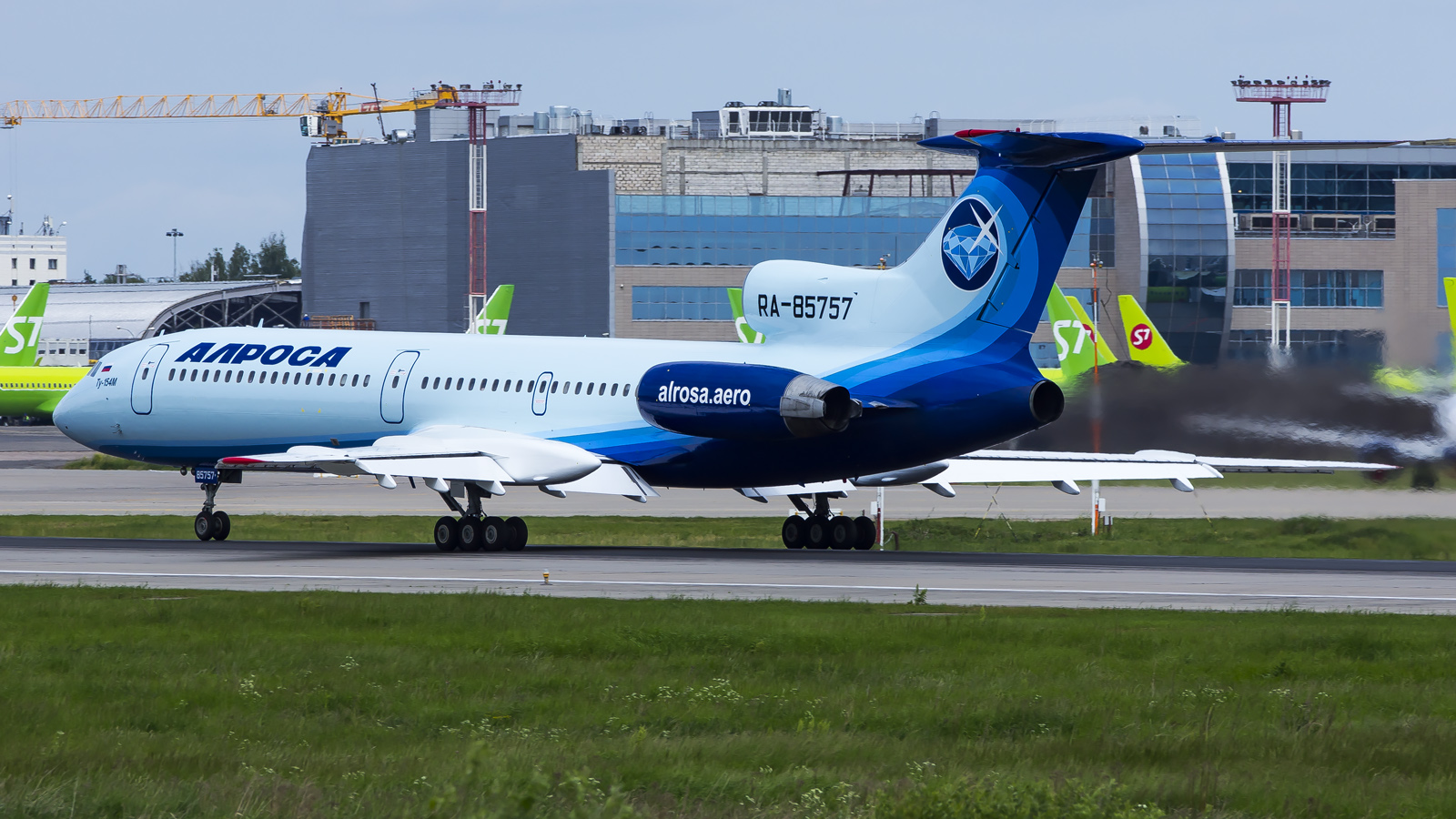 RA-85757 Tupolev 154M Alrosa DME | UUDD